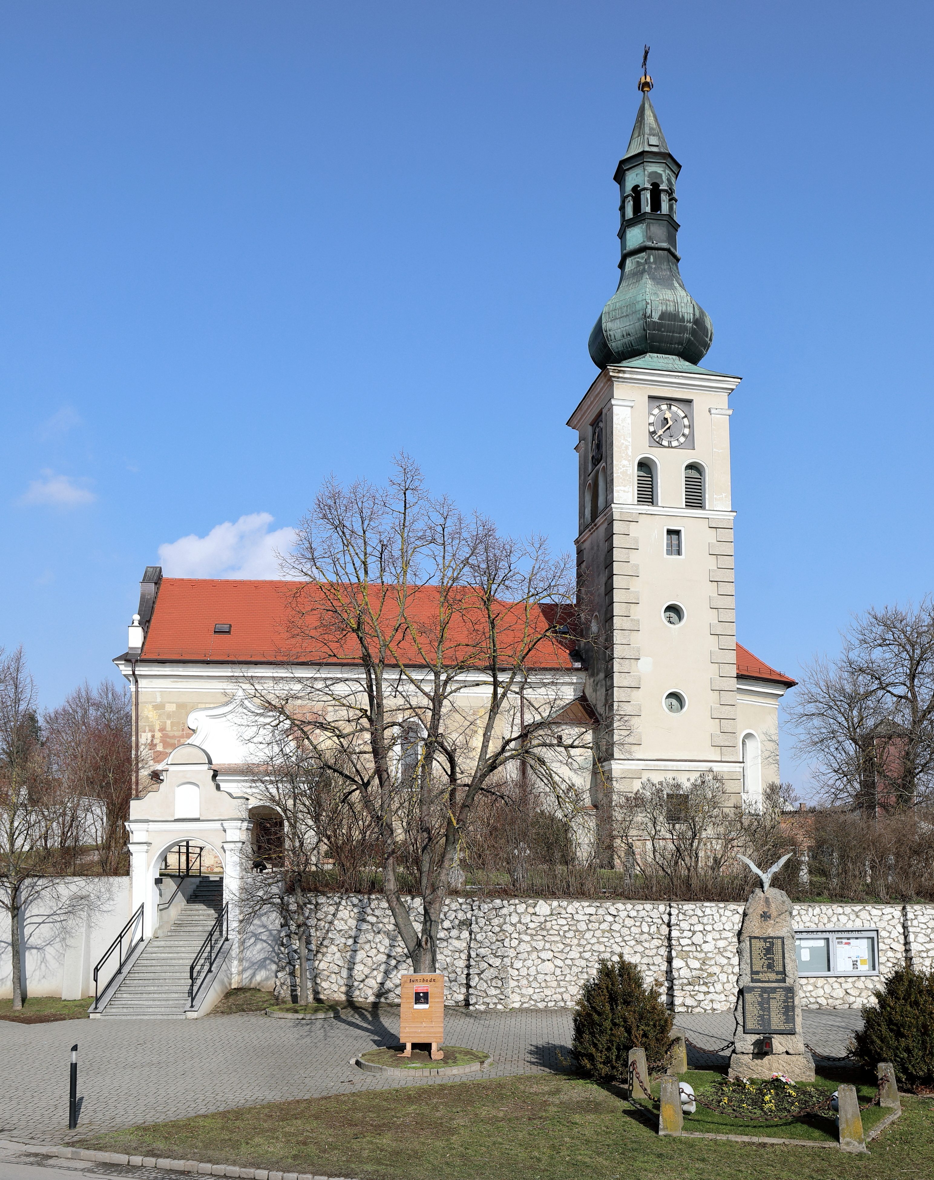 Die röm.-kath. Pfarrkirche hl. Johannes der Täufer in Niedersulz, ein Ortsteil der niederösterreichischen Marktgemeinde Sulz im Weinviertel. Eine im Kern mittelalterliche Kirche, die 1623 umgebaut und barockisiert wurde.